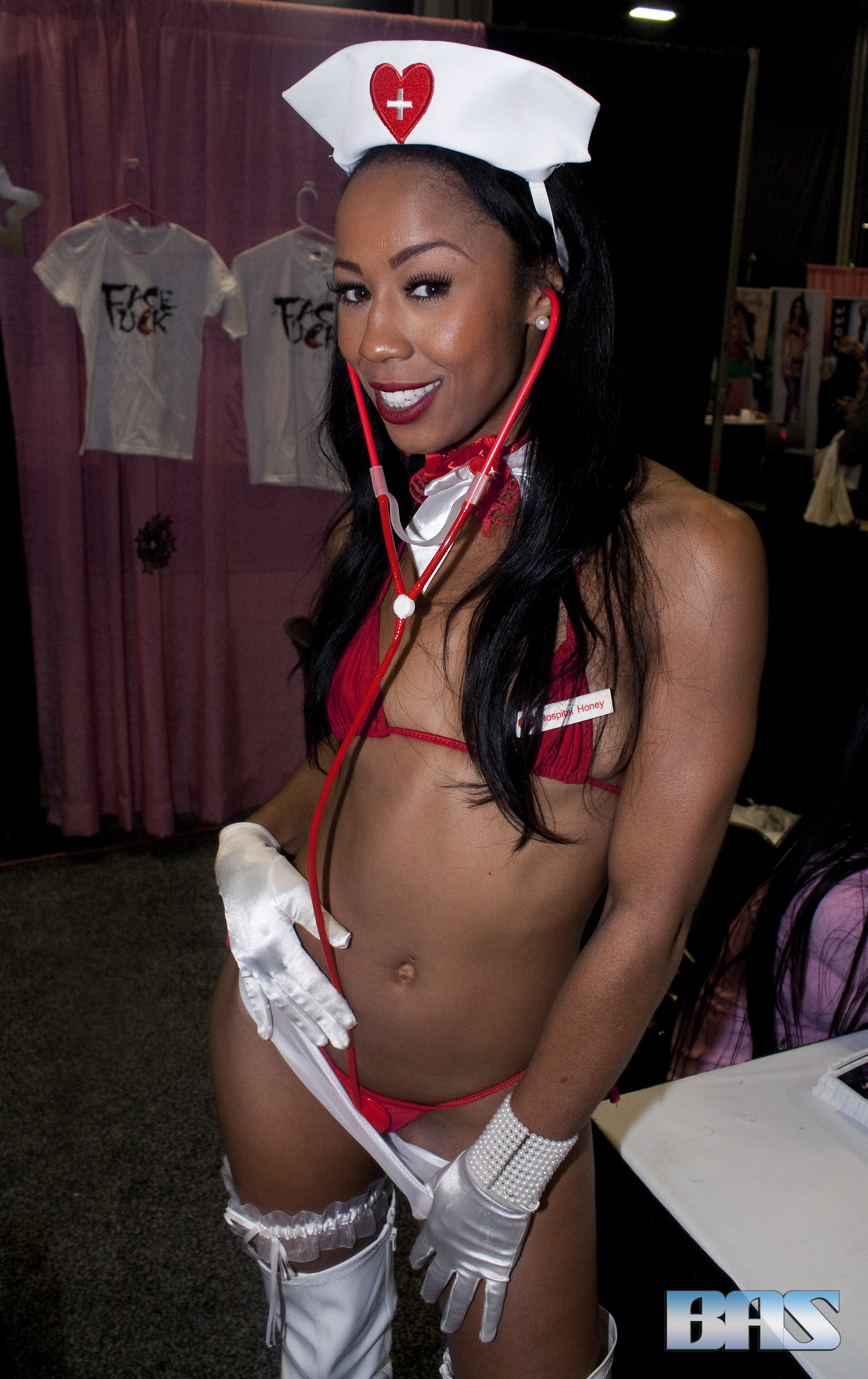 ExxxNJ14_177bas